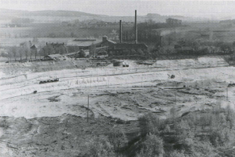 Dörentruper Quarzsandgrube von Norden